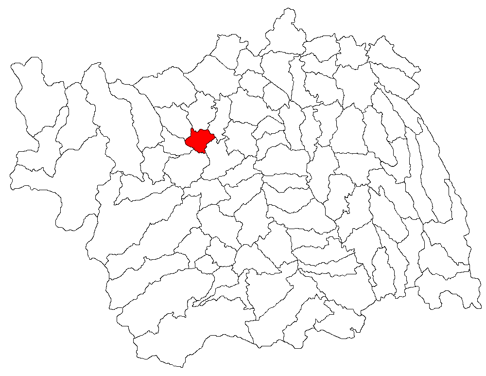 Categorie:Hărţi ale judeţului Bacău